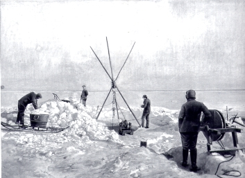 mesure des courants sous-marin pendant l'hivernage